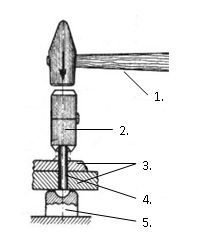 Momentul nituirii.1. Ciocan sau ciocan pneumatic2. Căpuitor3. Traversă metalică4. Nit5. Contracăpuitor